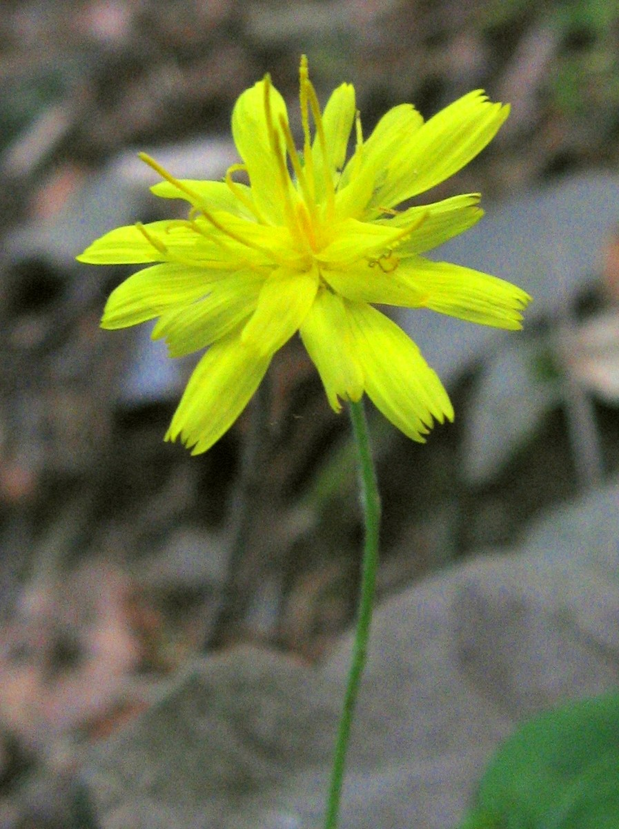 Hieracium racemosum Waldst. & Kit. ex Willd. subsp. virgaurea (Coss.) Zahn